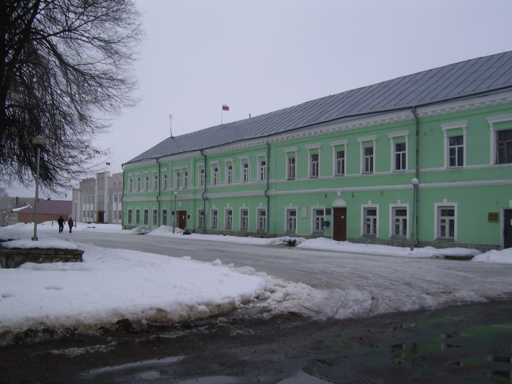 be:Горад Веліж